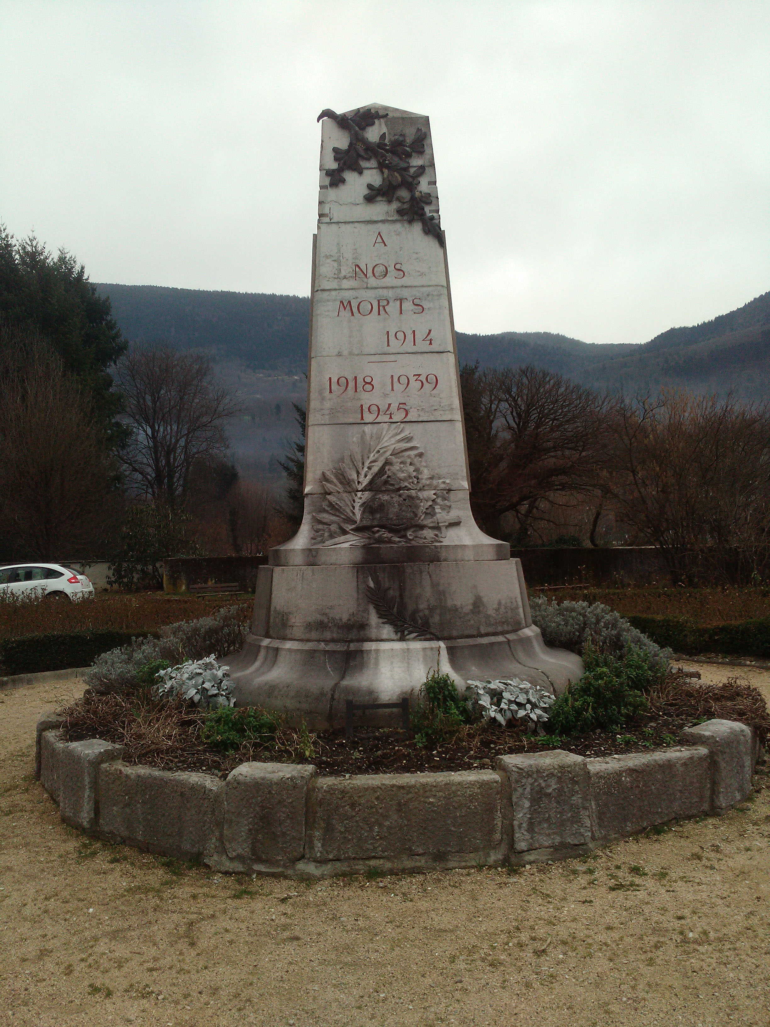 Monument aux morts de Vaulnaveys-le-Haut